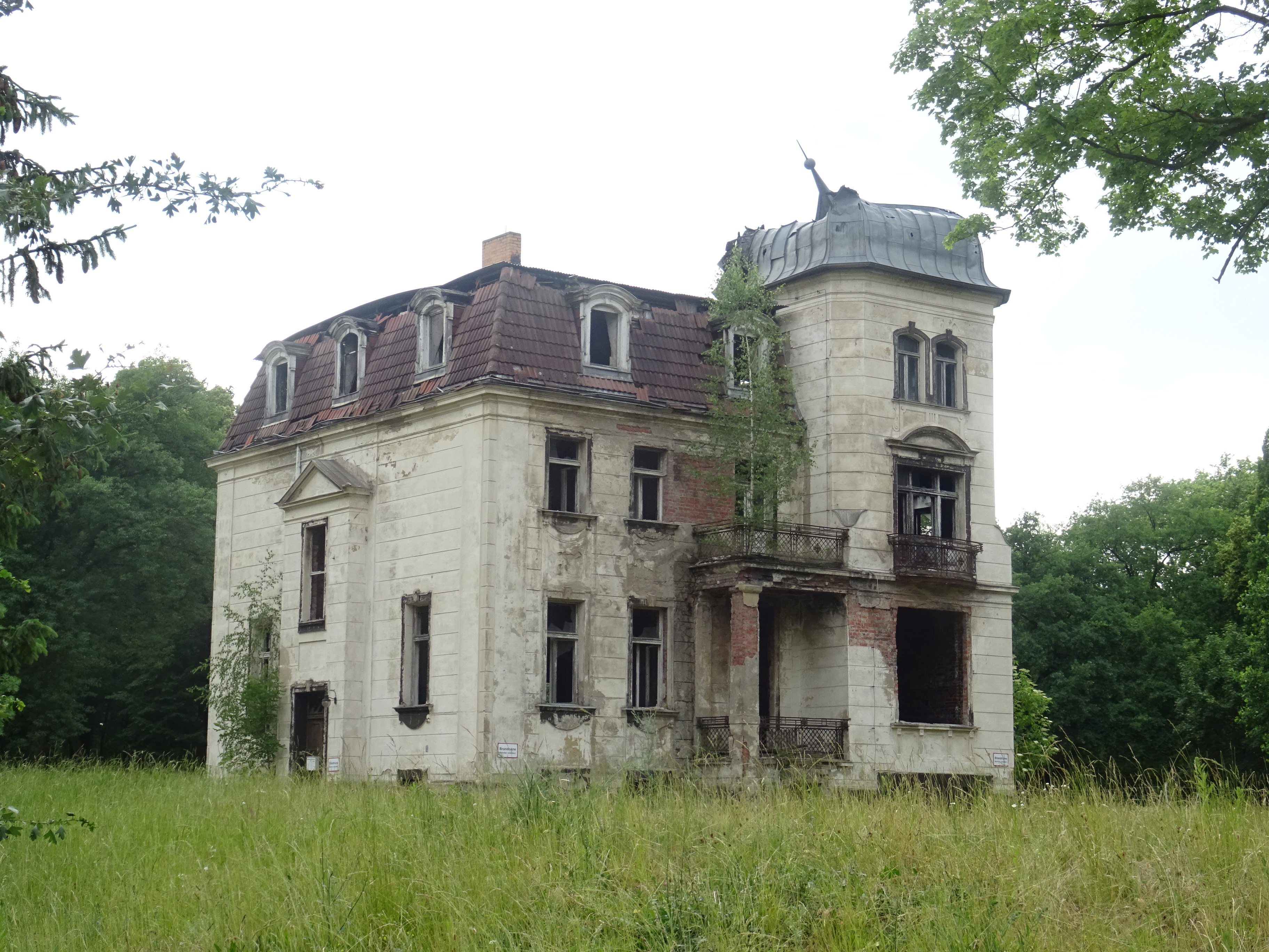 Schloss Raakow, 2018, nach Brandschaden